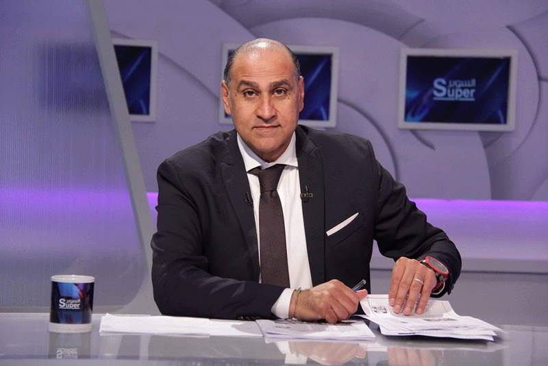 المحلل الرياضي خالد محمد بيومي